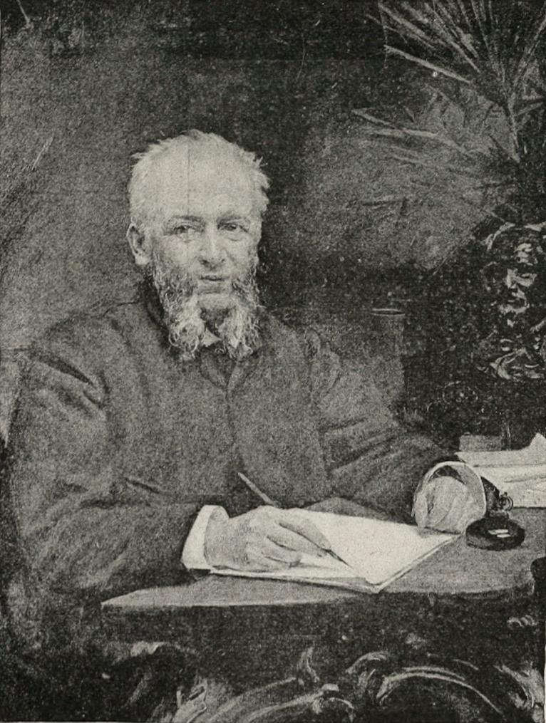 M. Pierre Legrand